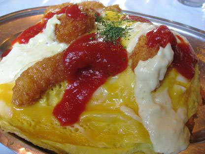 石川県金沢市の郷土料理であるハントンライス